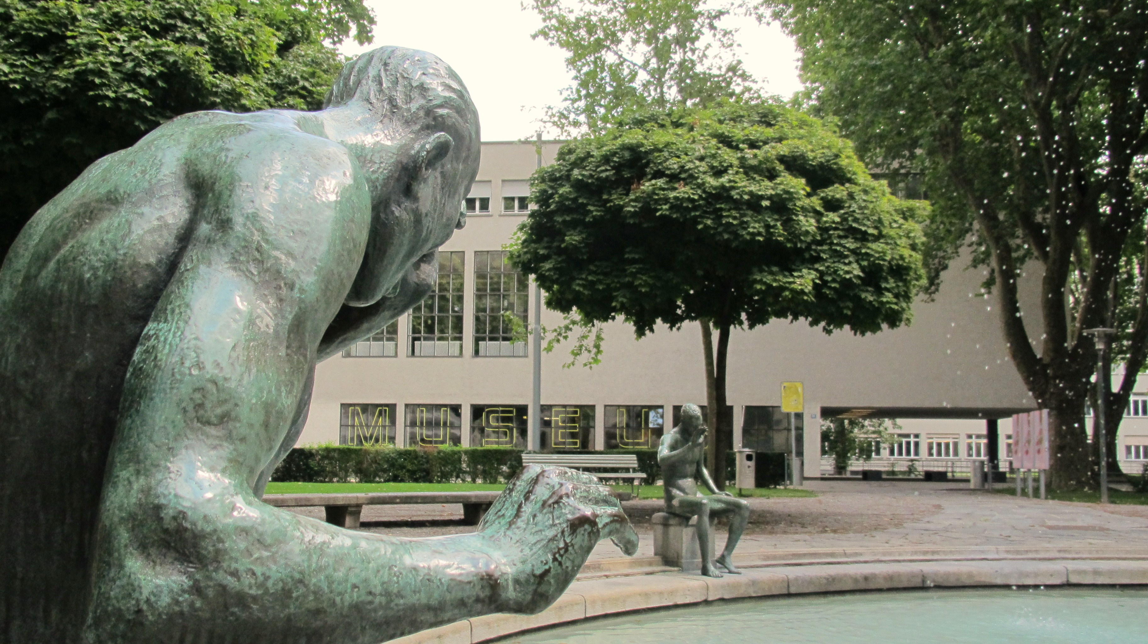 Zürich, Hochschule für Gestaltung und Kunst sowie Museum. Zürcher Hochschule der Künste (ZHdK), Ausstellungsstrasse 60